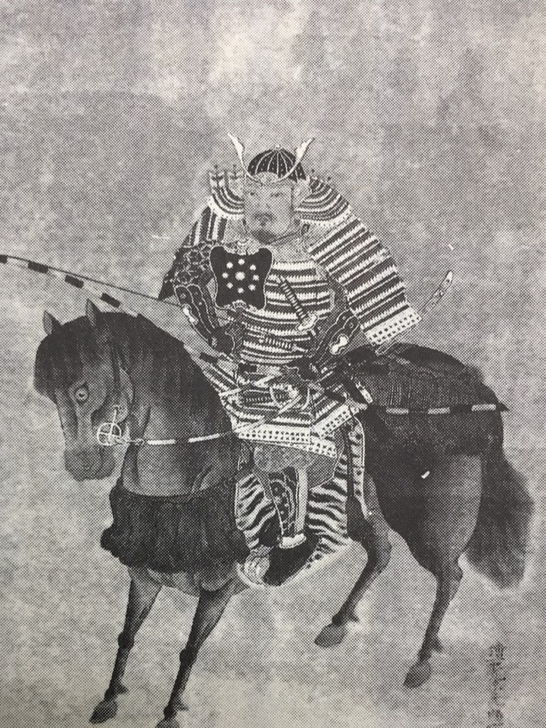 加藤直泰の肖像(モノクロ)。